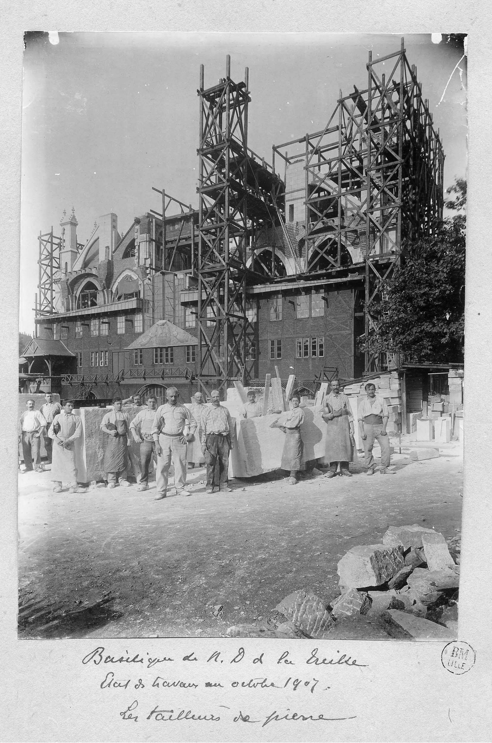 Lille - Basilique Mineure* Notre-Dame de la Treille, futur cathédrale. — Les tailleurs de pierre. État des travaux en octobre 1907. *Le 7 octobre 1904, Le pape Pie X accorde par un bref pontifical, le titre de basilique mineure à l'église Notre-Dame de la Treille.